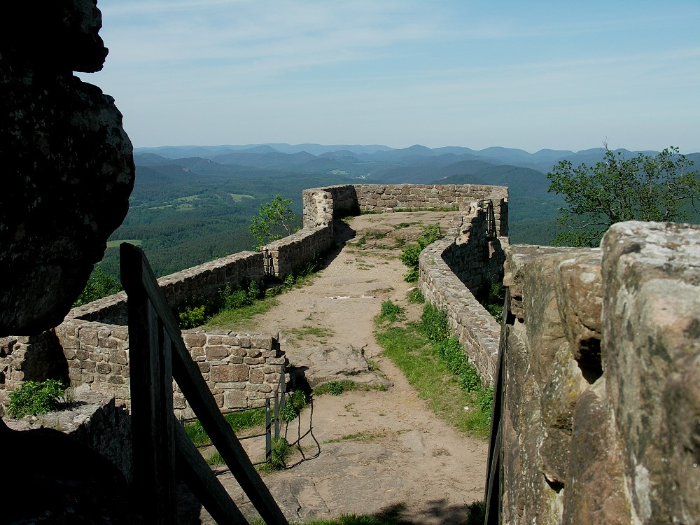 Wegelnburg, mittlere Burgebene Datum: 26.5.2005 Fotograf: Peter Schmenger